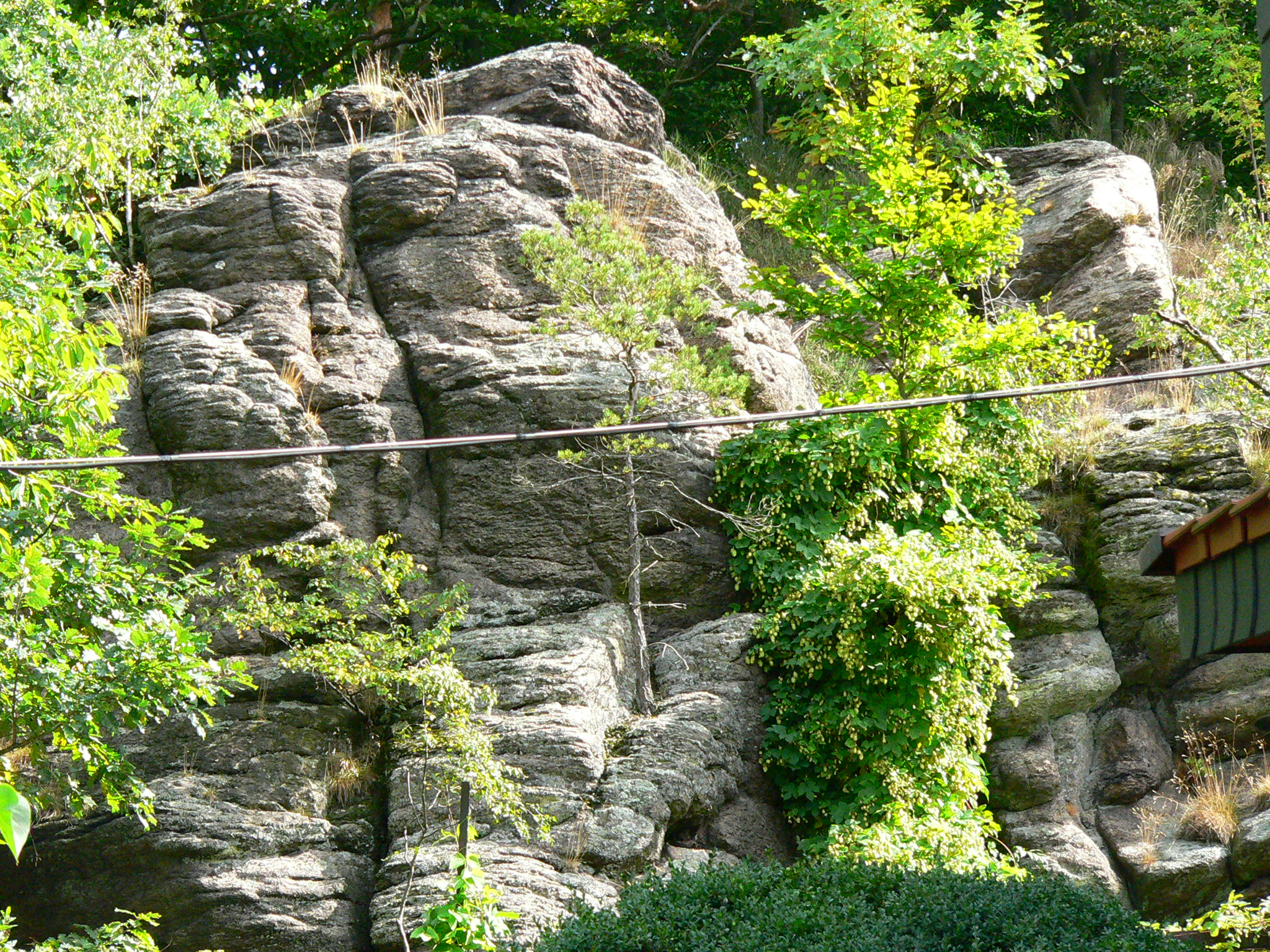 Felsformation am Böllstein, Odenwald, Deutschland